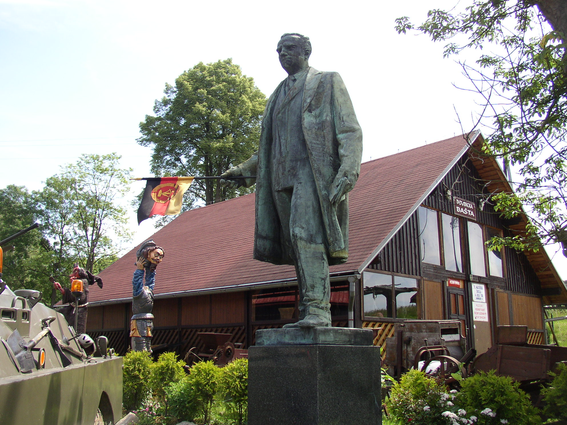 Socha Klementa Gottwalda před Starou hospodou v Doubici, Doubice, okres Děčín, Česká republika